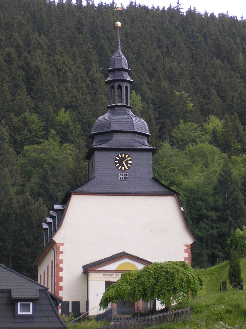 Die Kirche von Katzhütte (Thüringen).